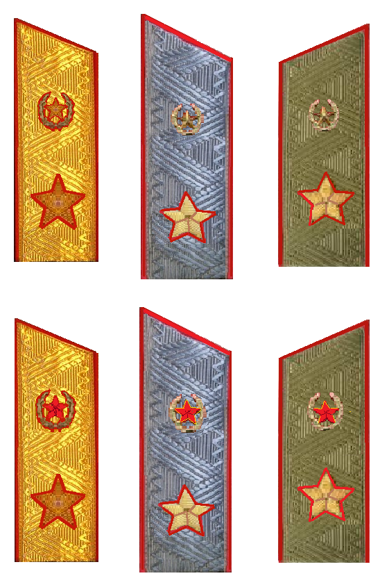 погоны 1970-80